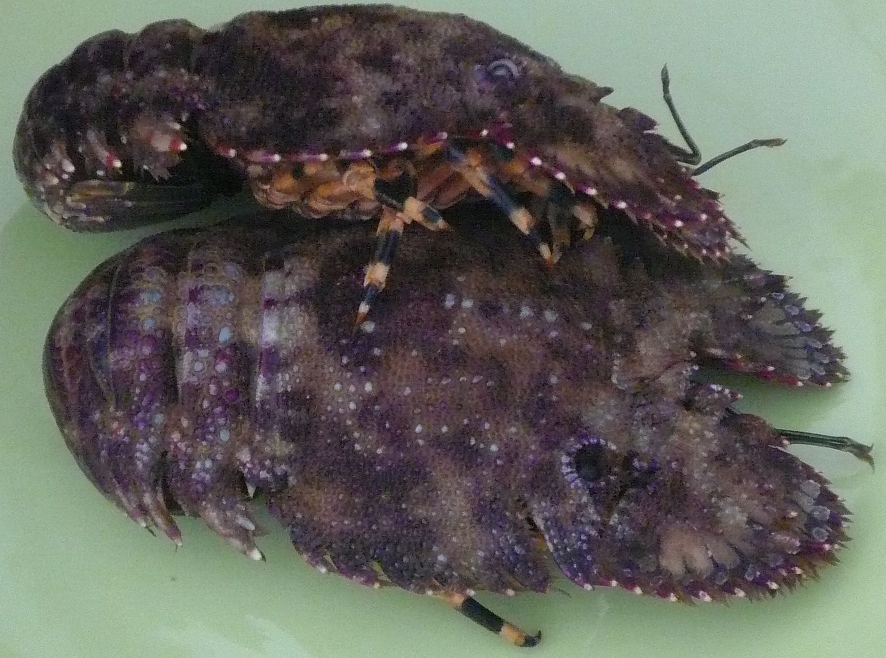 deux popinées